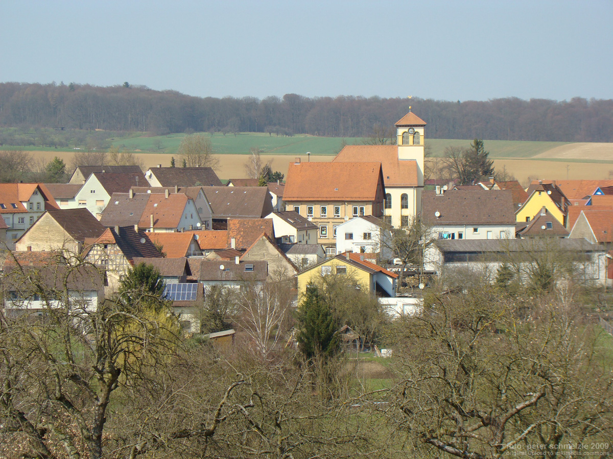 Ansicht der Ortsmitte von Berwangen